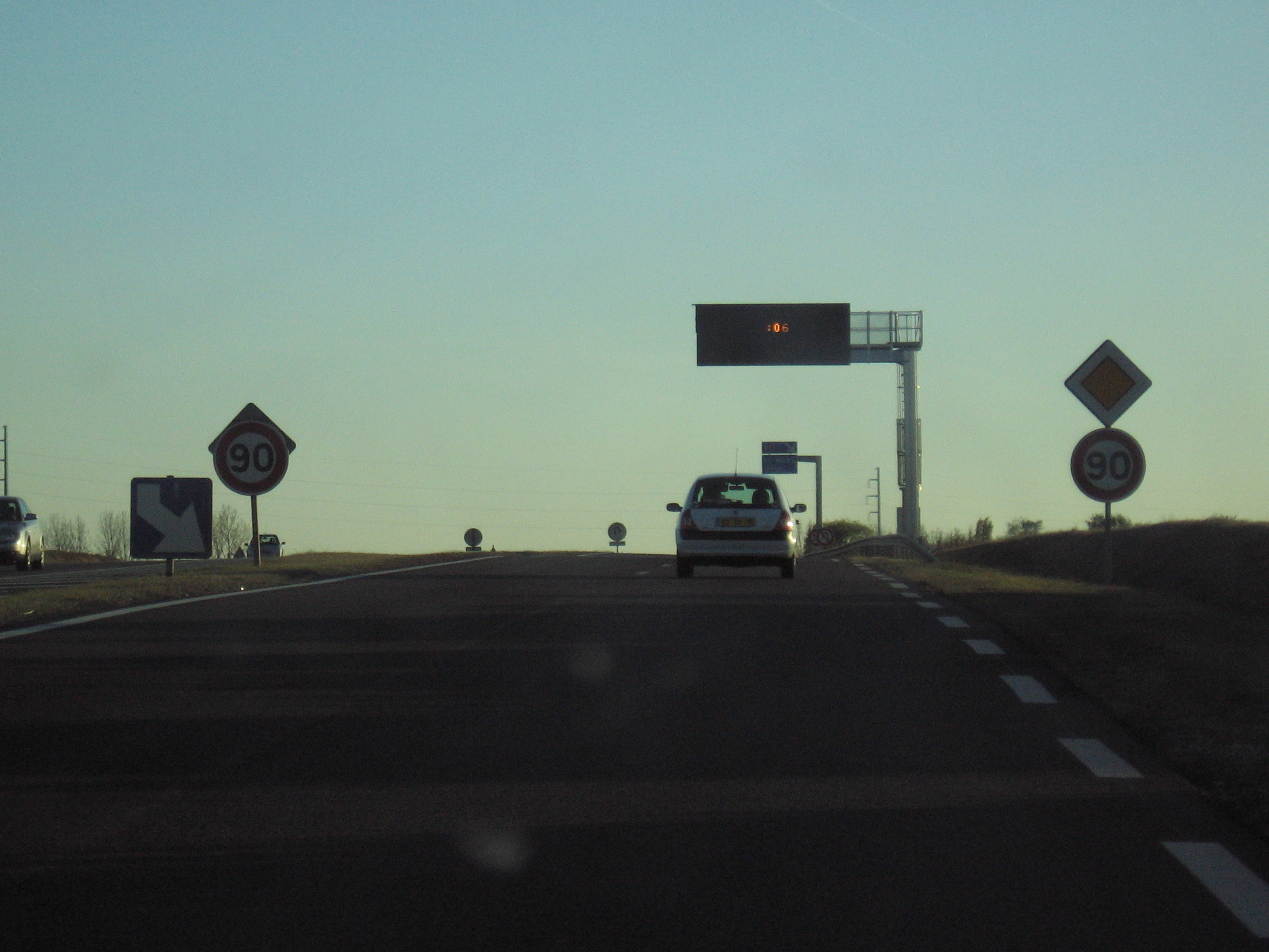 La RN10 au niveau de l'A11 au sud de Chartres